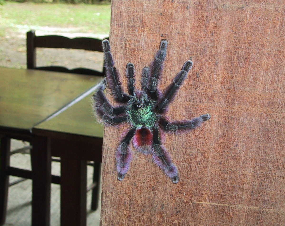 Photo d'une Caribena versicolor, syn. Avicularia versicolor, prise à Grande-Rivière (Martinique) en avril 2002 Caribena versicolor, syn. Avicularia versicolor, en af de floteste fugleedderkop i verden